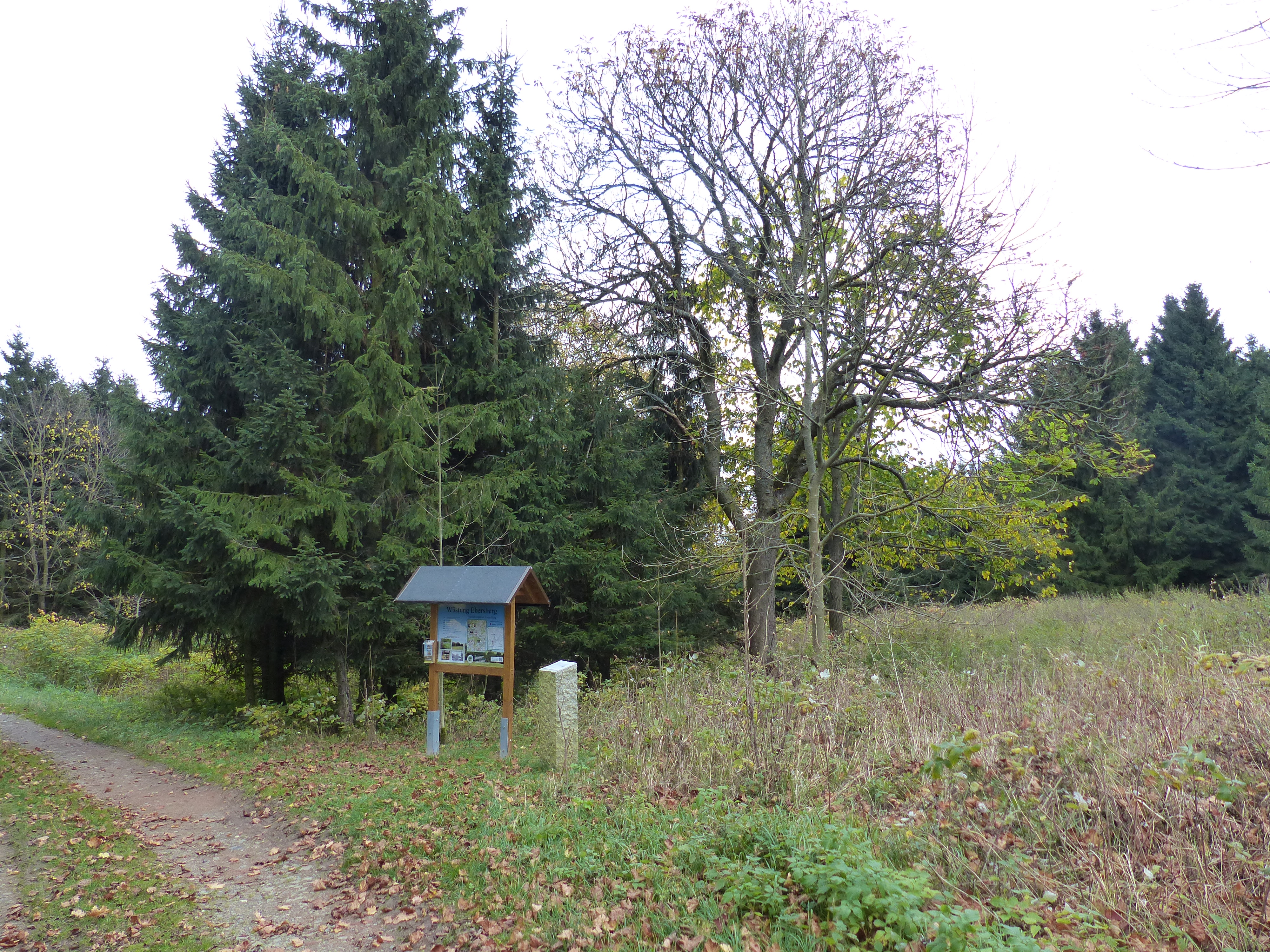 Bilderserie Wüstung Ebersberg mit Ortsansichten, Mauerresten, verbliebenen Bäumen